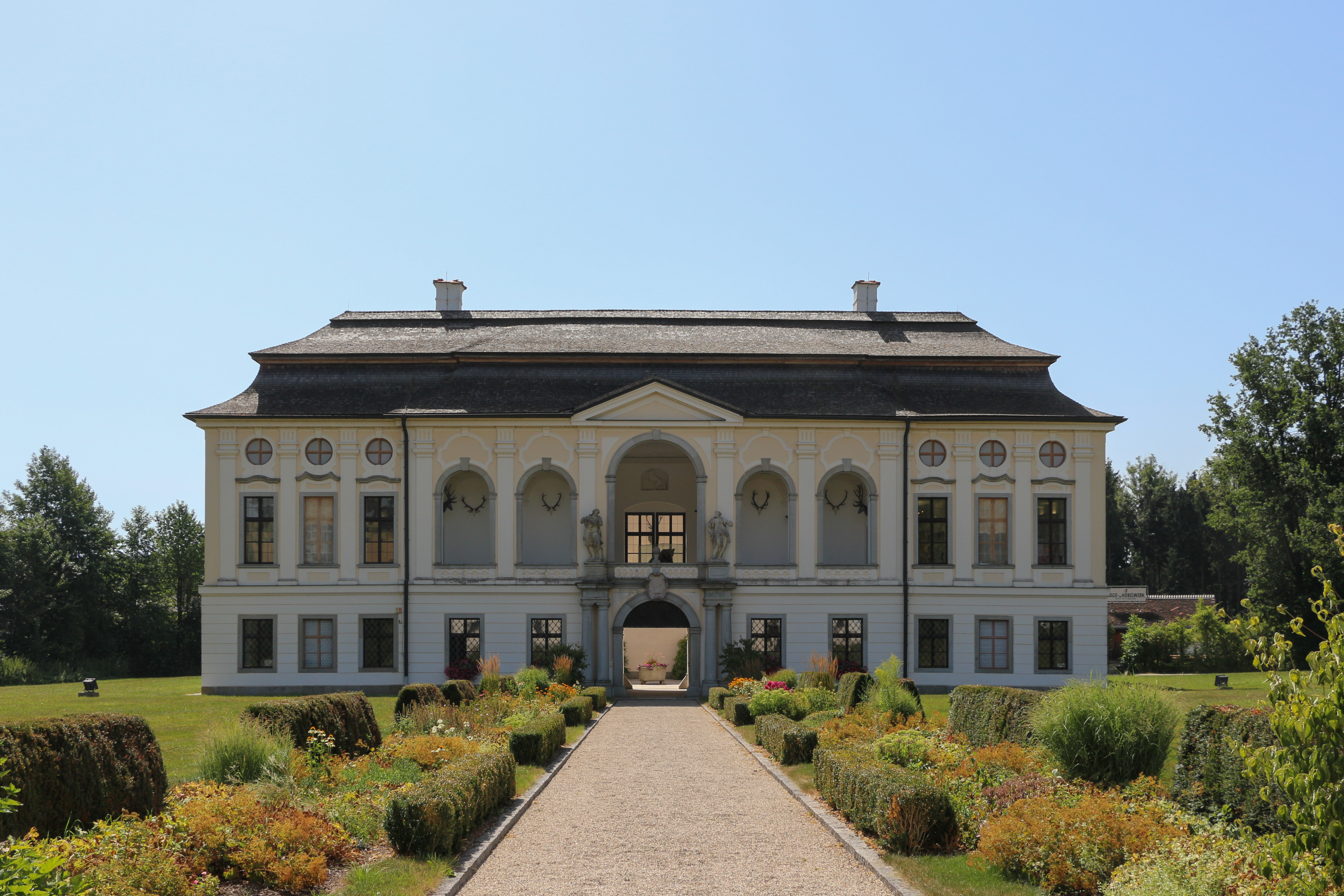 Schloss Hohenbrunn in St. Florian.